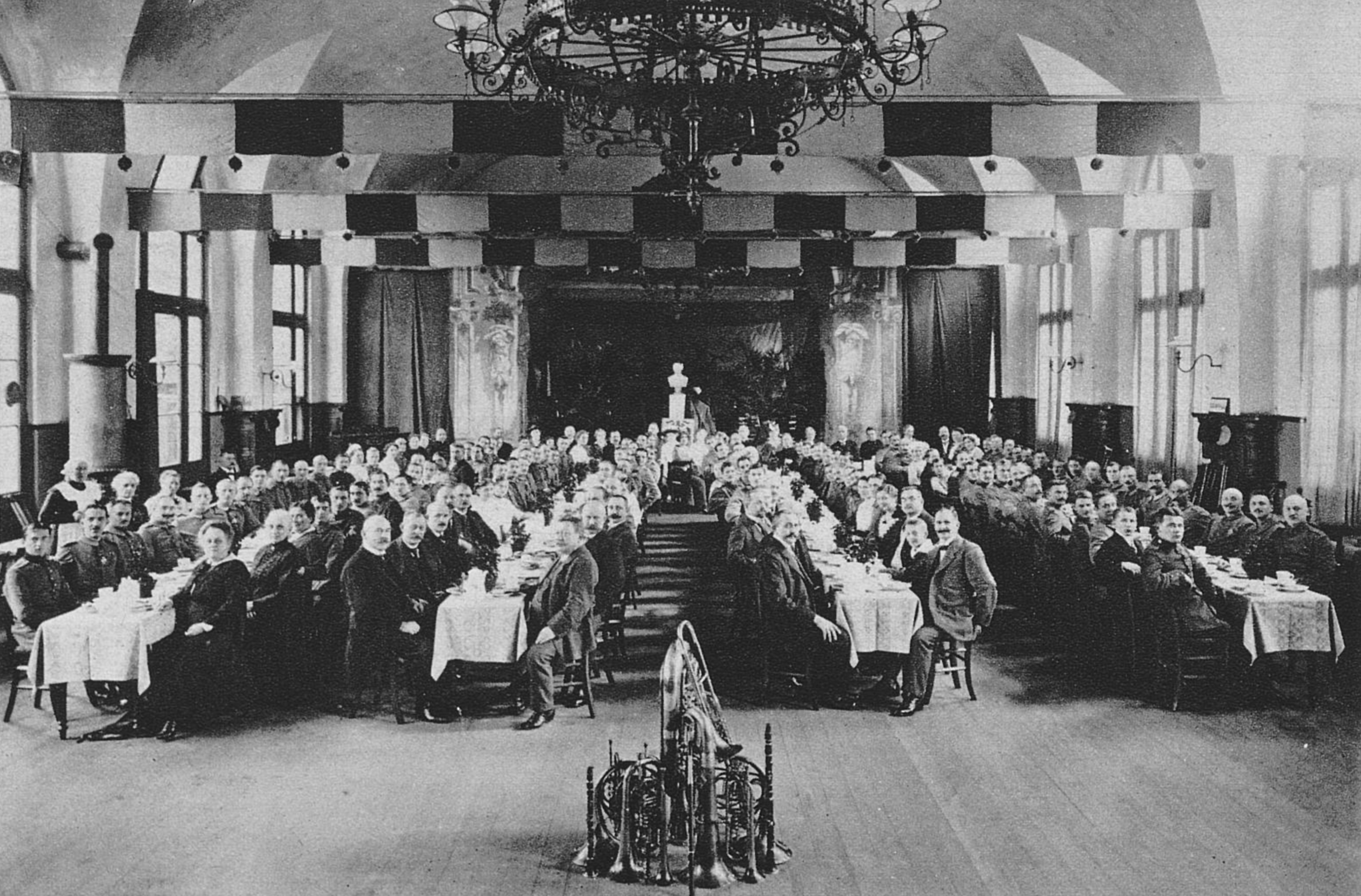 Saal in der Tonhalle des SüdensFestnachmittag für die Verwundeten des Flora-Lazaretts, dargeboten und geleitet von den Damen der Friedrichstadt in Düsseldorf (Oktober 1915)